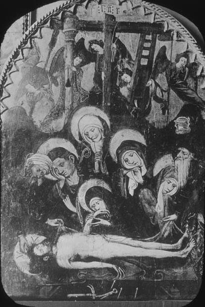 Imatge